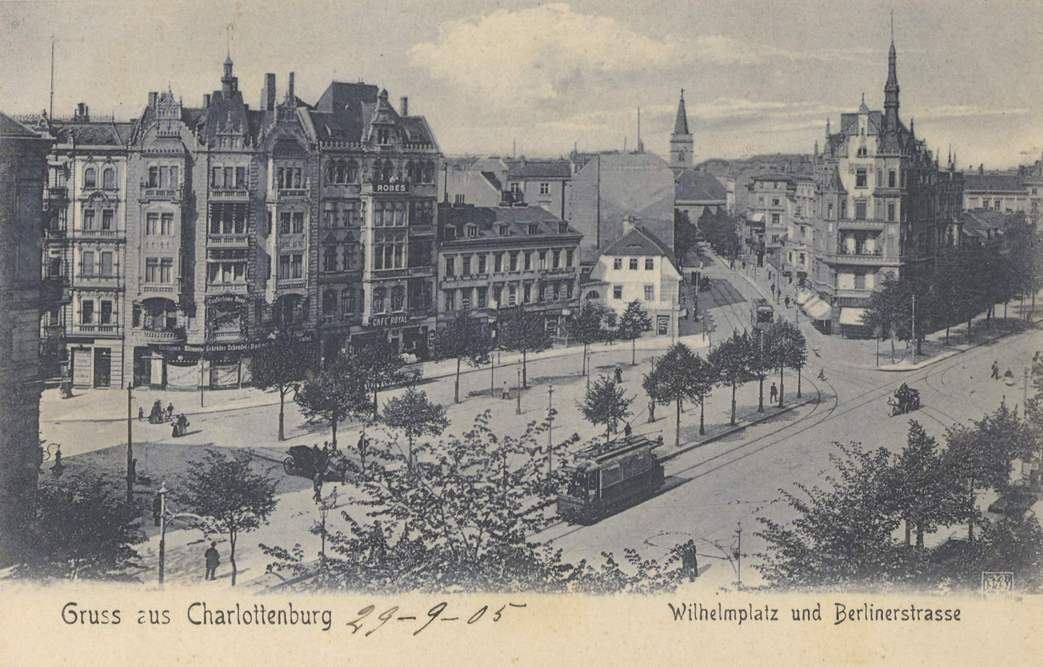 Wilhelmplatz (heute Richard-Wagner-Platz) in Charlottenburg. Blick vom Rathausturm zur Scharrenstraße (heute Schustehrusstraße).